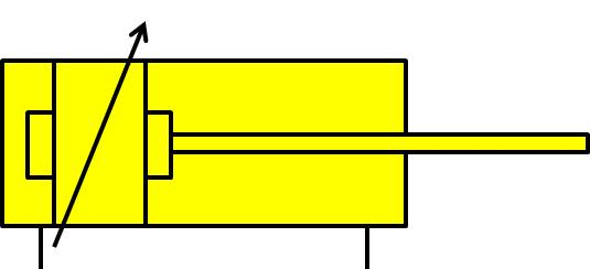 Schaltsymbol doppeltwirkender Zylinder mit einstellbarer Dämpfung